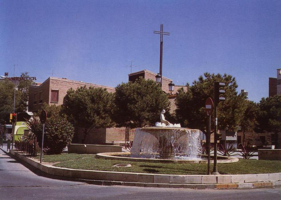 Plaza de General Palacios, ubicada en el centro de Getafe (Comunidad de Madrid), España